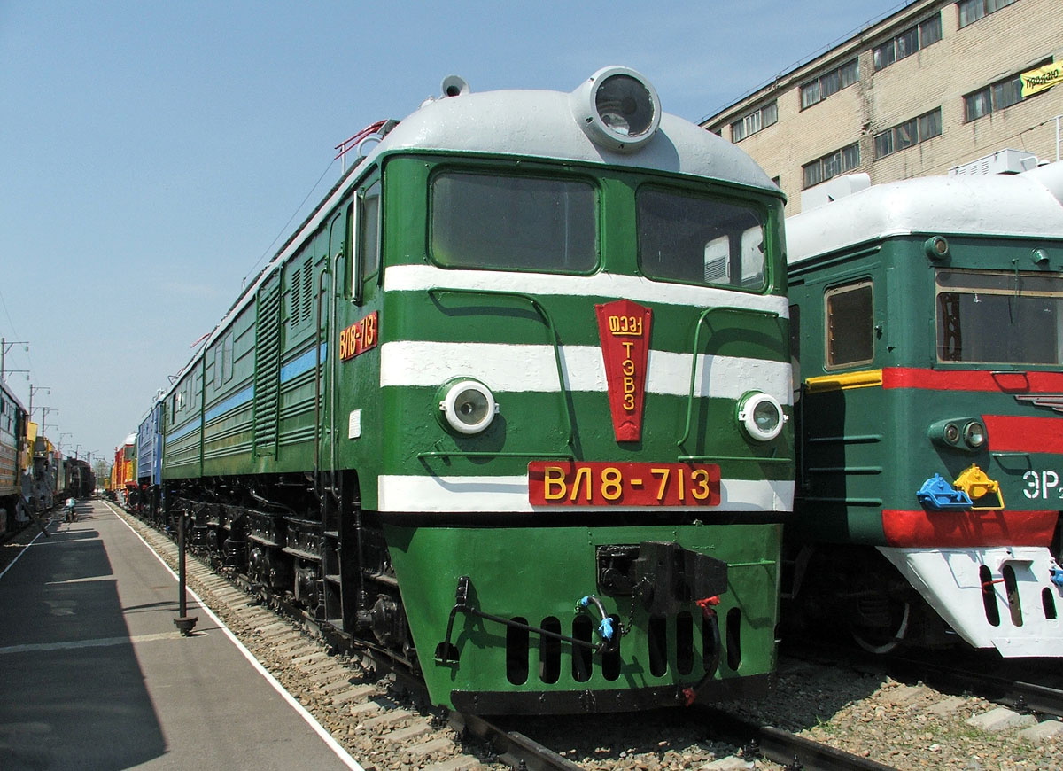 Электровоз ВЛ8-713. Ростовский музей железнодорожного транспорта СКЖД